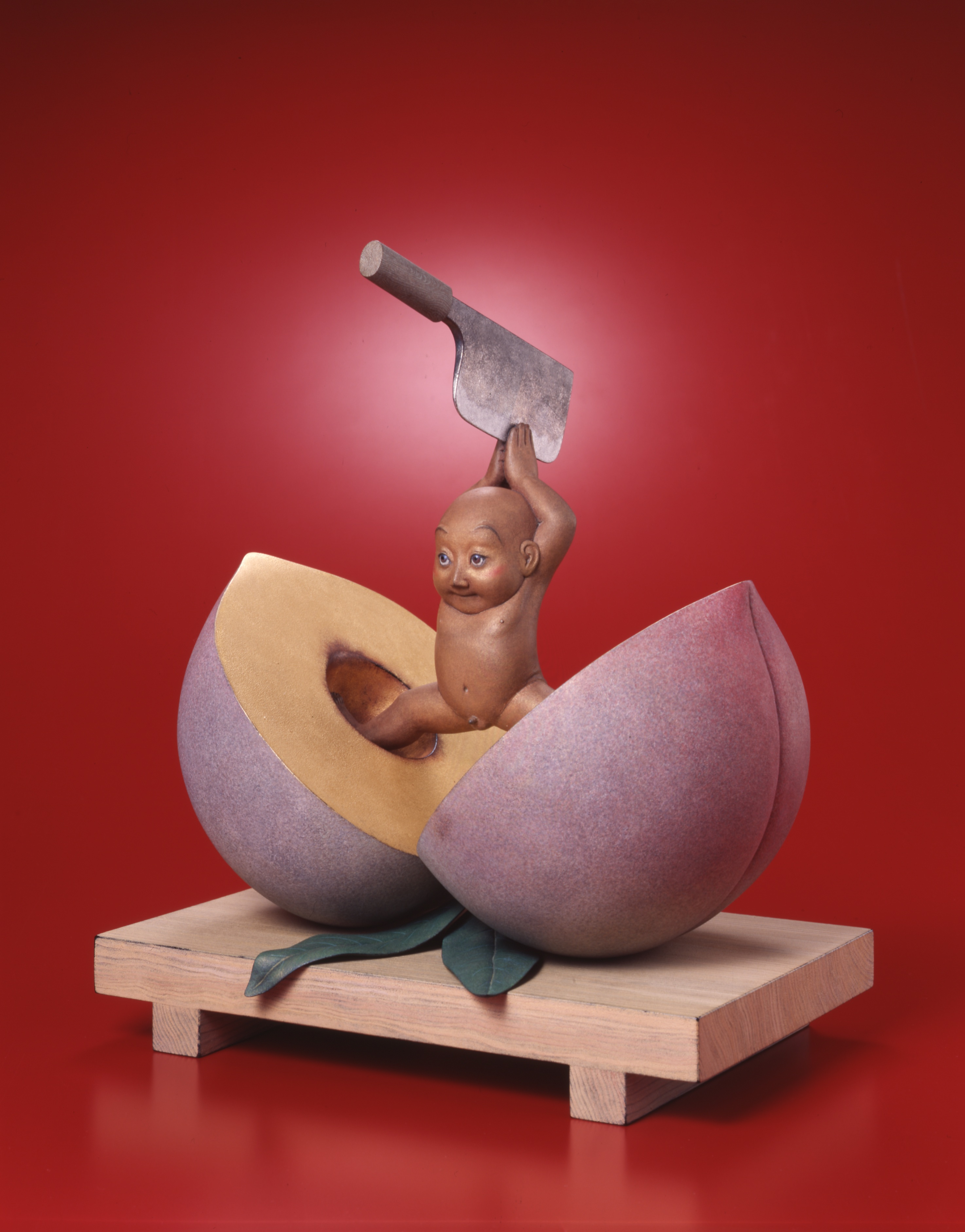 籔内佐斗司の制作する「童子」作品の１つ。 素材には檜、漆、顔料を使用。